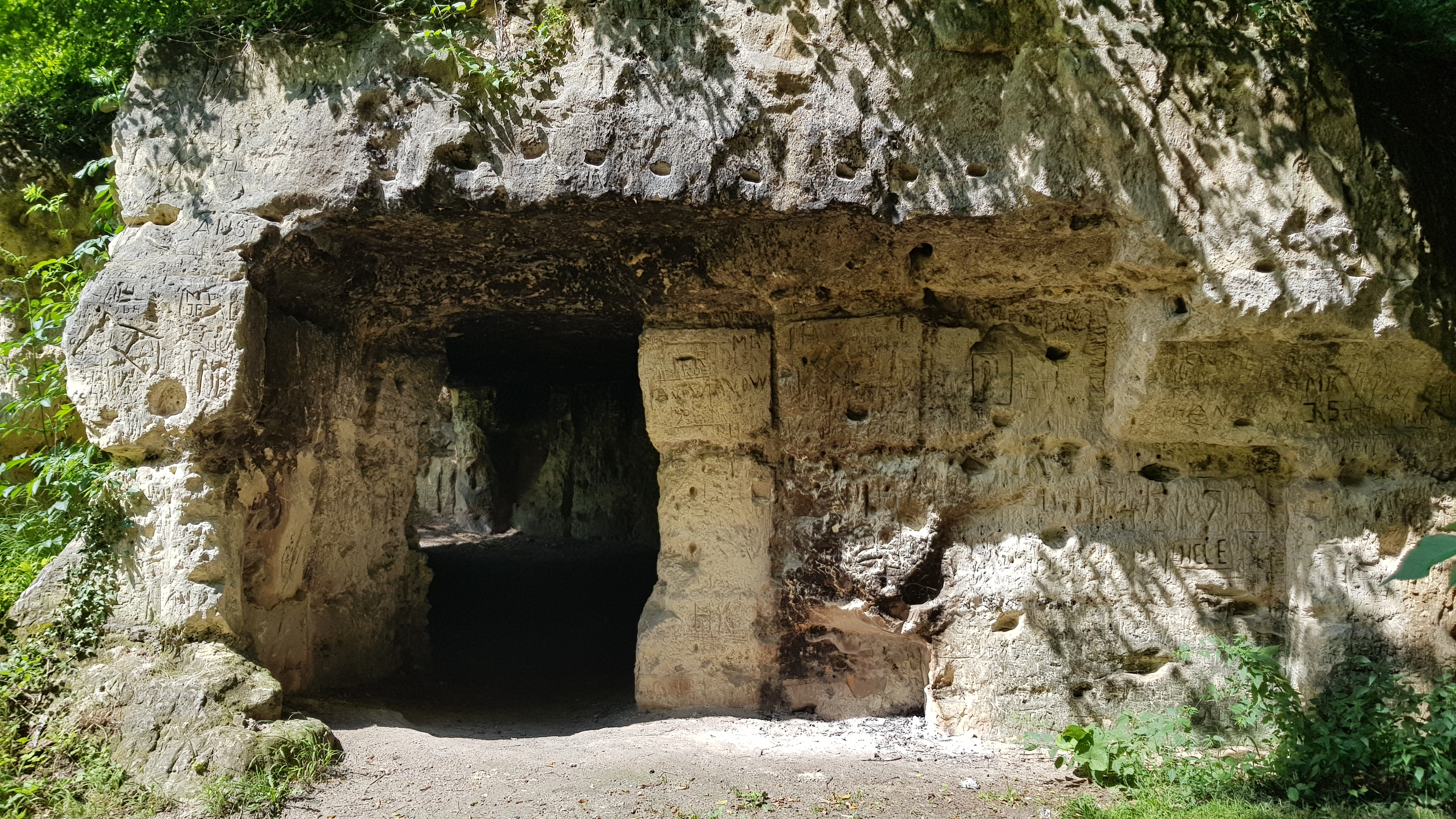 Geologisch Monument Groeve Trichterberg, Savelsbos, Gronsveld, Nederland